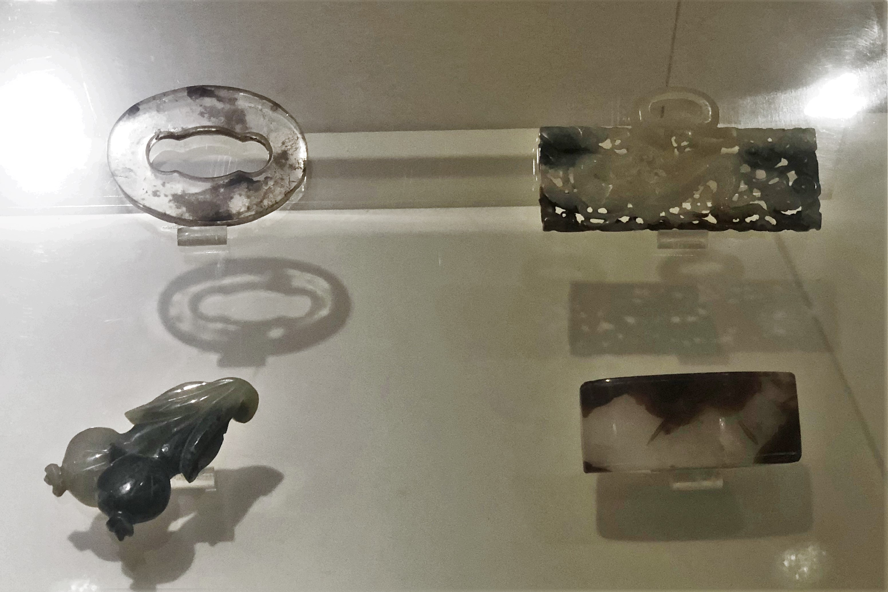 中文（中国大陆）: 水晶环、玉花果、灰白玉龙纹带饰、玉wei。元。西林塔出土。